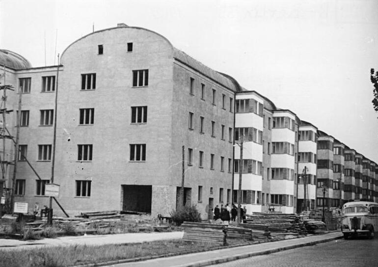 Berlin, Pankow, Wohnblocks, Baustelle Pressebesichtigung der Wohnbauten, die ausserhalb des nationalen Aufbauprogramms entstehen. Am 6. September 1952 fand für die Pressevertreter eine Besichtigung der Wohngebäude statt, die ausserhalb des nationalen Aufbauprogramms Berlin 1952 entstanden sind. UBz: Wohnstätte in der Prenzlauer-Promenade in Pankow. Zum 1. November 1952 werden Wohnungen bezugsfertig. Zentralbild-Krüger Zi-We. N 6.9.1952